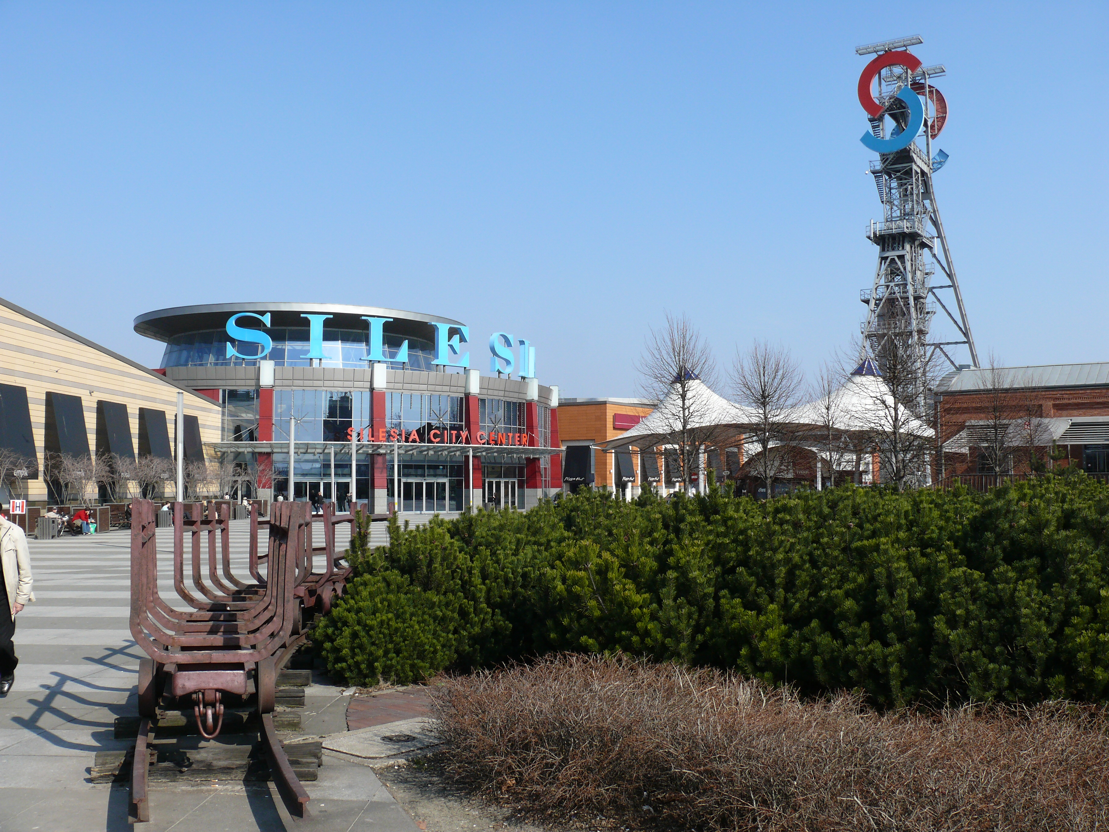 Das Silesia City Center, ein großes Einkaufszentrum auf dem Gelände einer ehemaligen Zeche in Kattowitz.